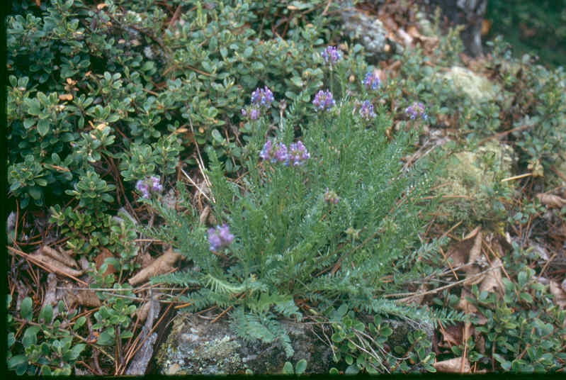 Oxytropis_viscida_1-eheep